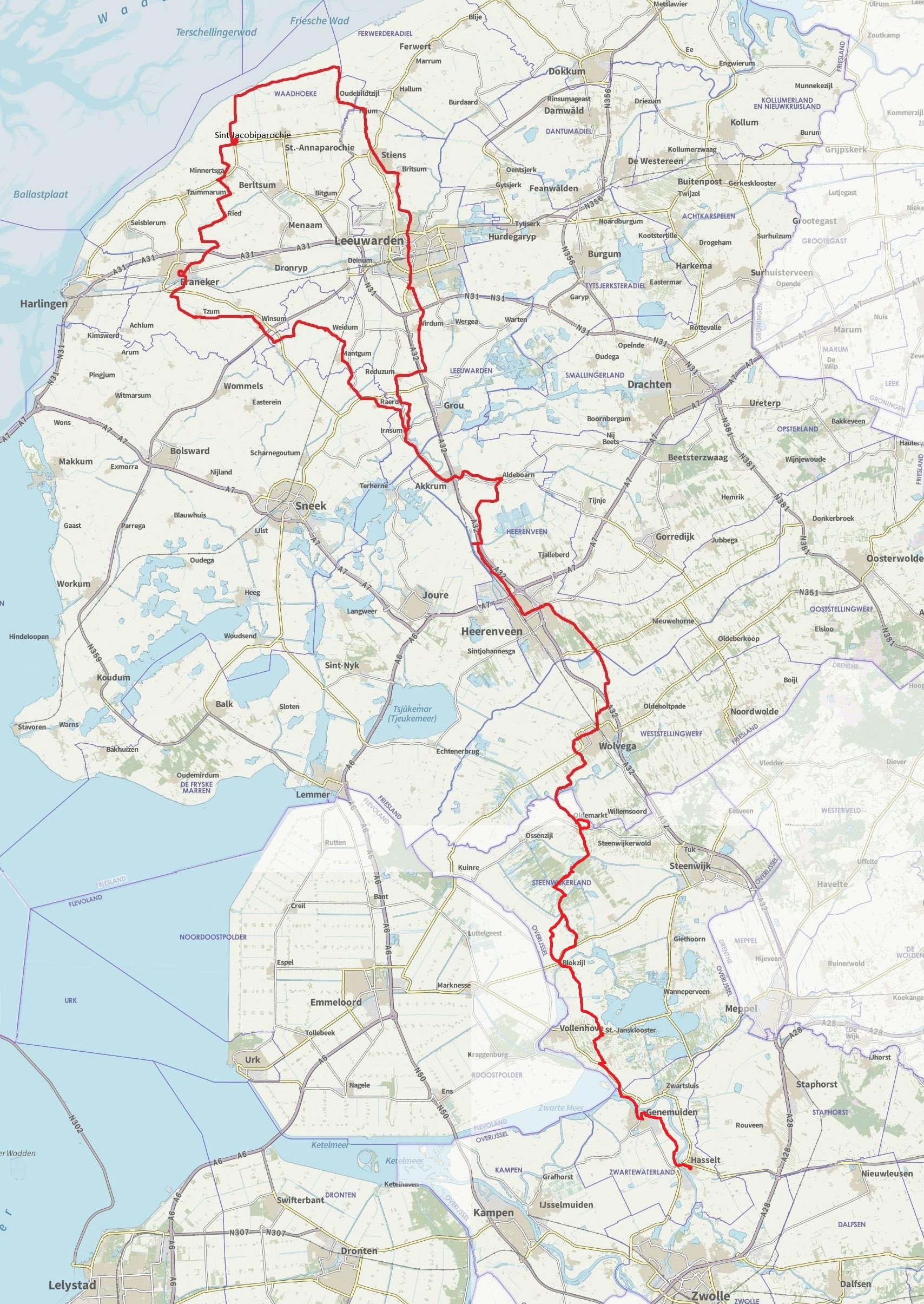 Jabikspaad route. Pelgrimsroute van Sint Jacobiparochie (Friesland) naar Hasselt (Overijssel), Nederland.